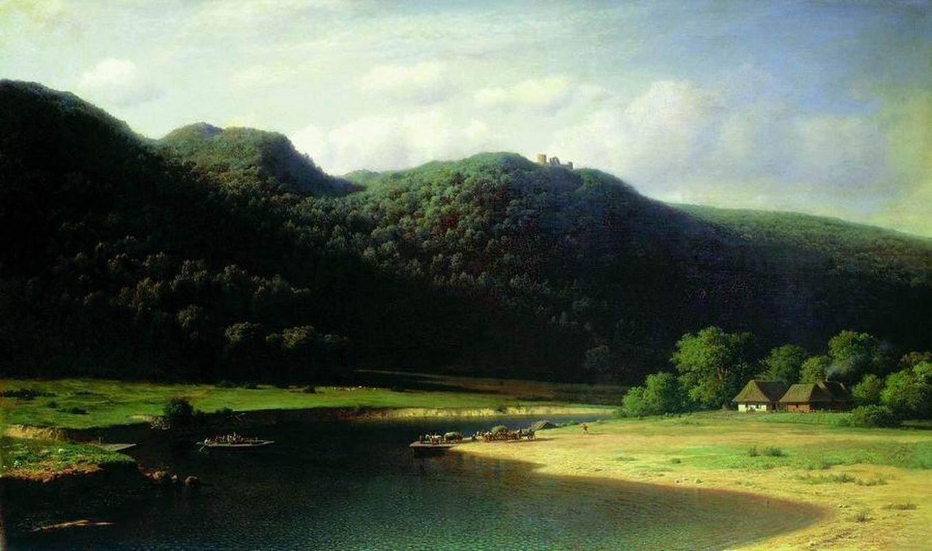 Долина реки Аа в Лифляндии. 1862 Холст, масло, 97 x 160 Государственный Русский музей